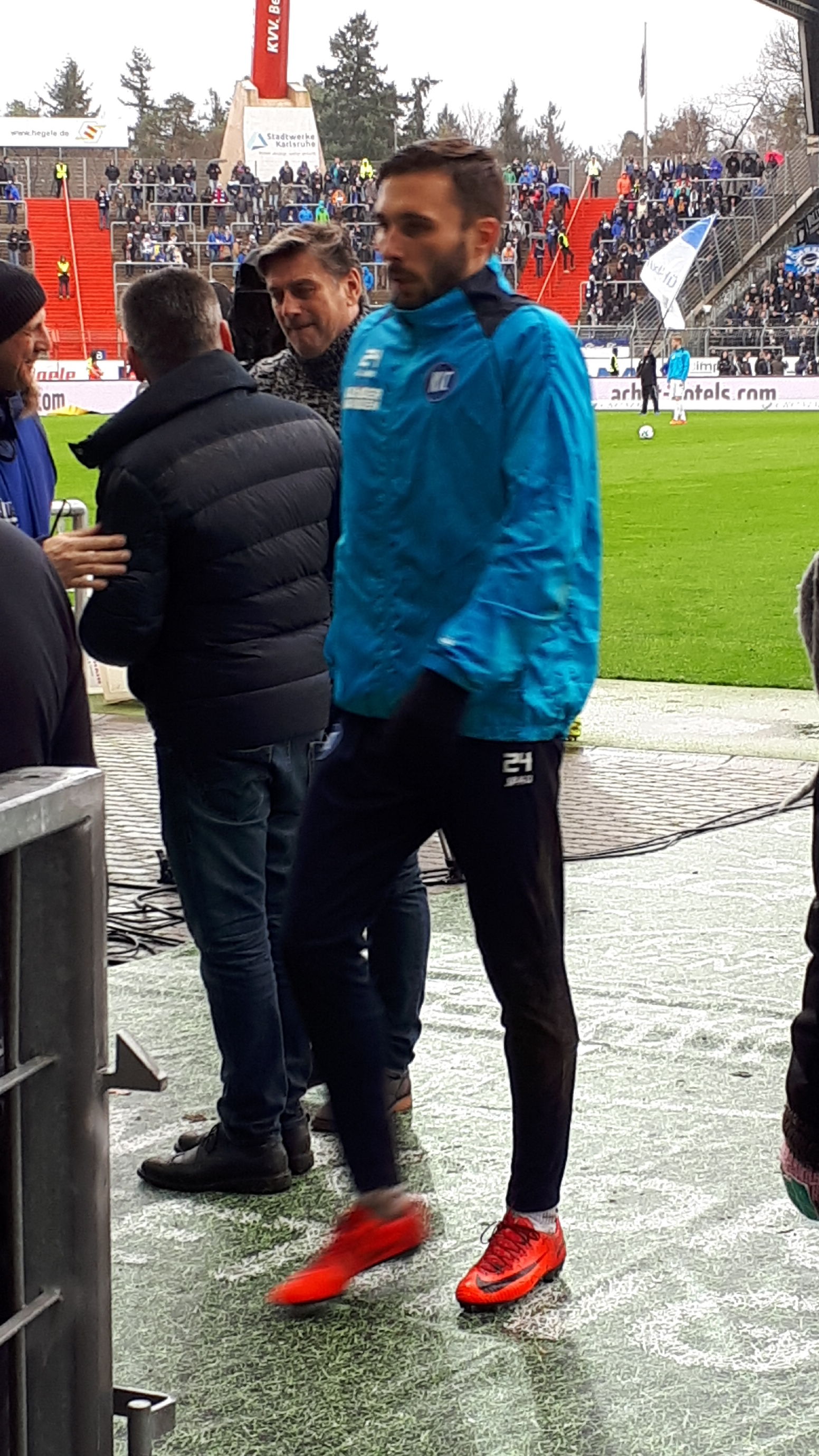 Fußballspieler Fabian Schleusener beim Heimspiel des Karlsruher SC gegen die SpVgg Unterhaching am 20. Januar 2018.